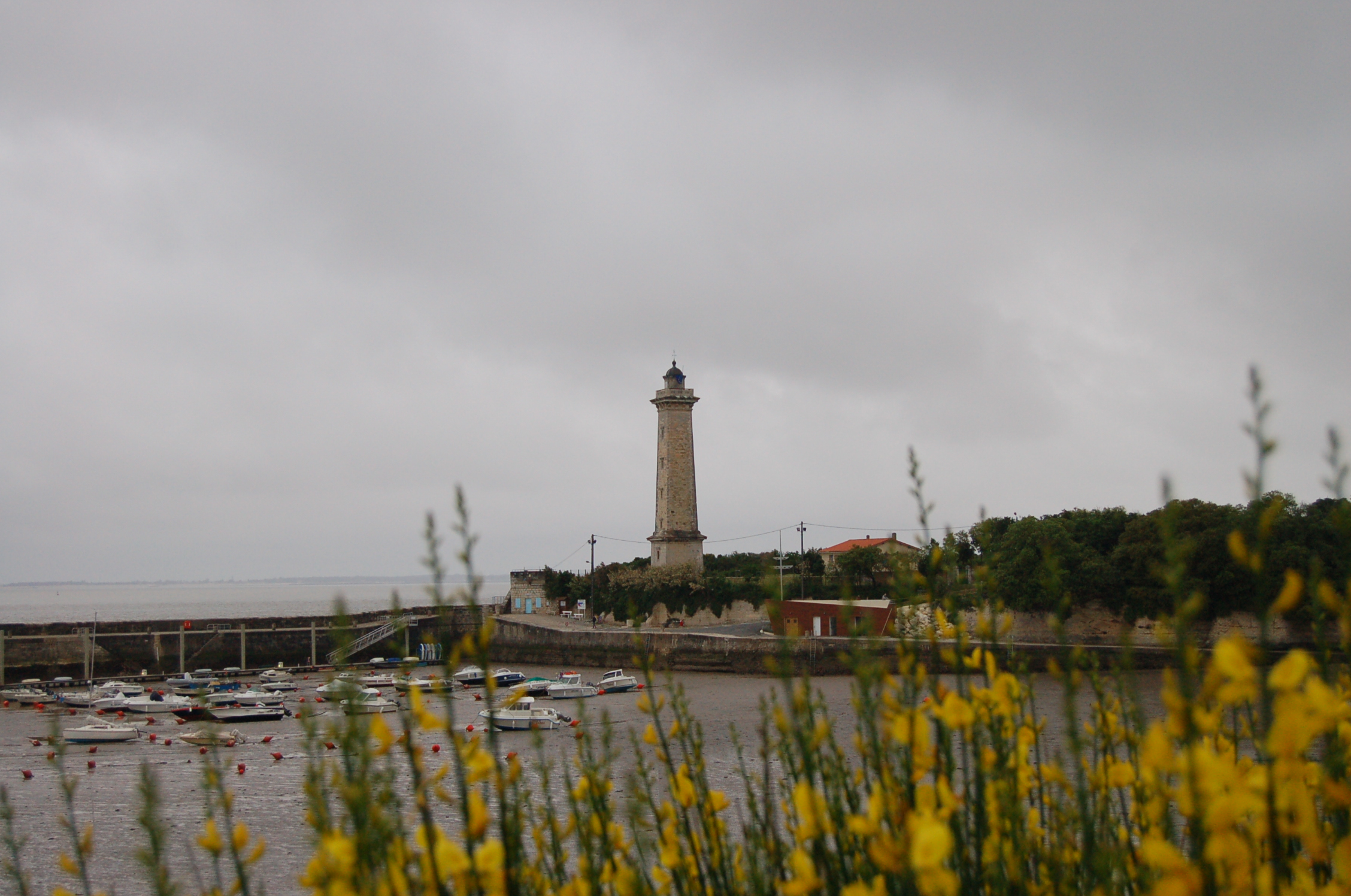 Phare et port de St Georges de Didonne (France - Charente Maritime)